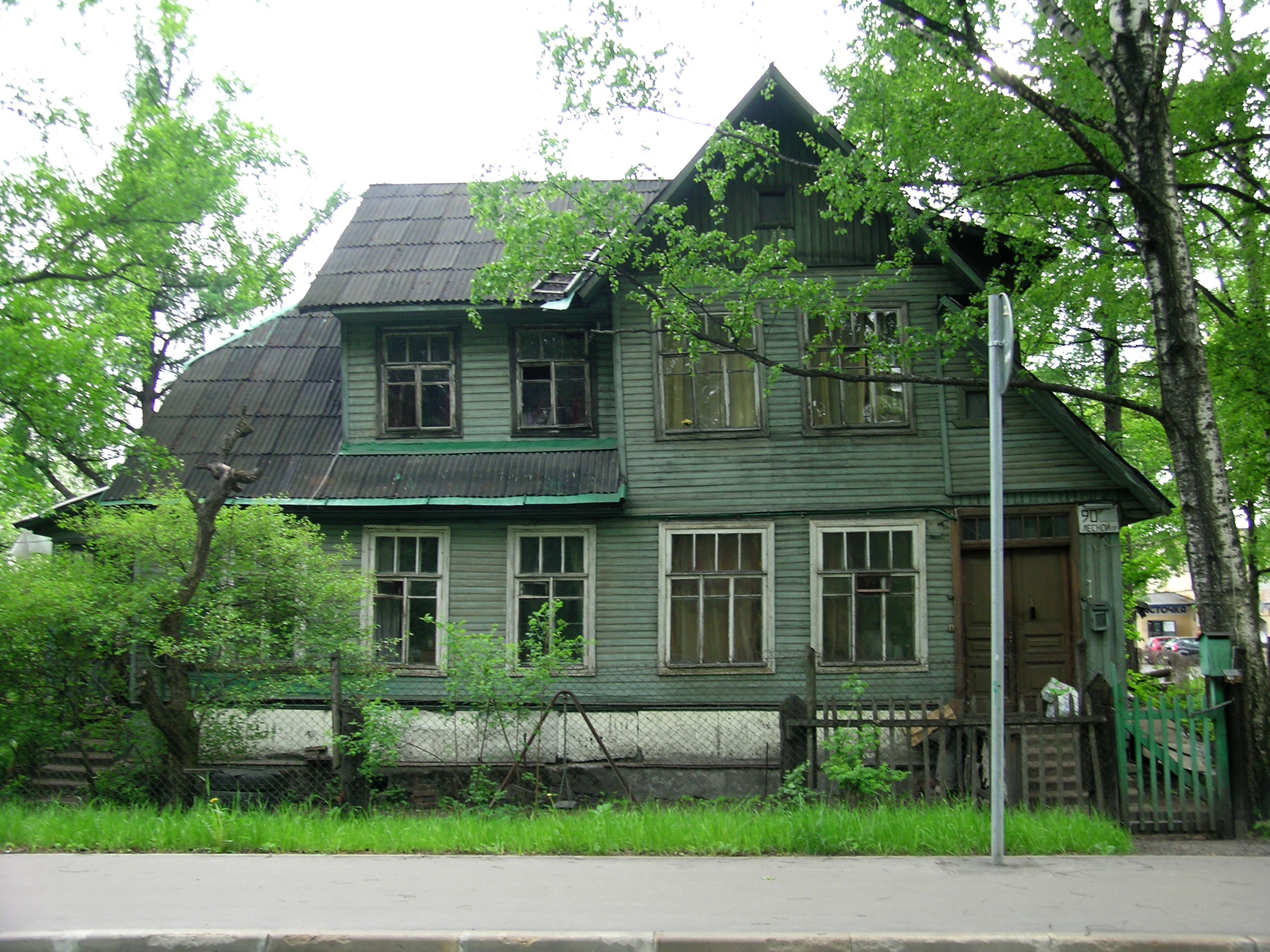 Деревянное строение. Лесной пр., 90 Весна 2011